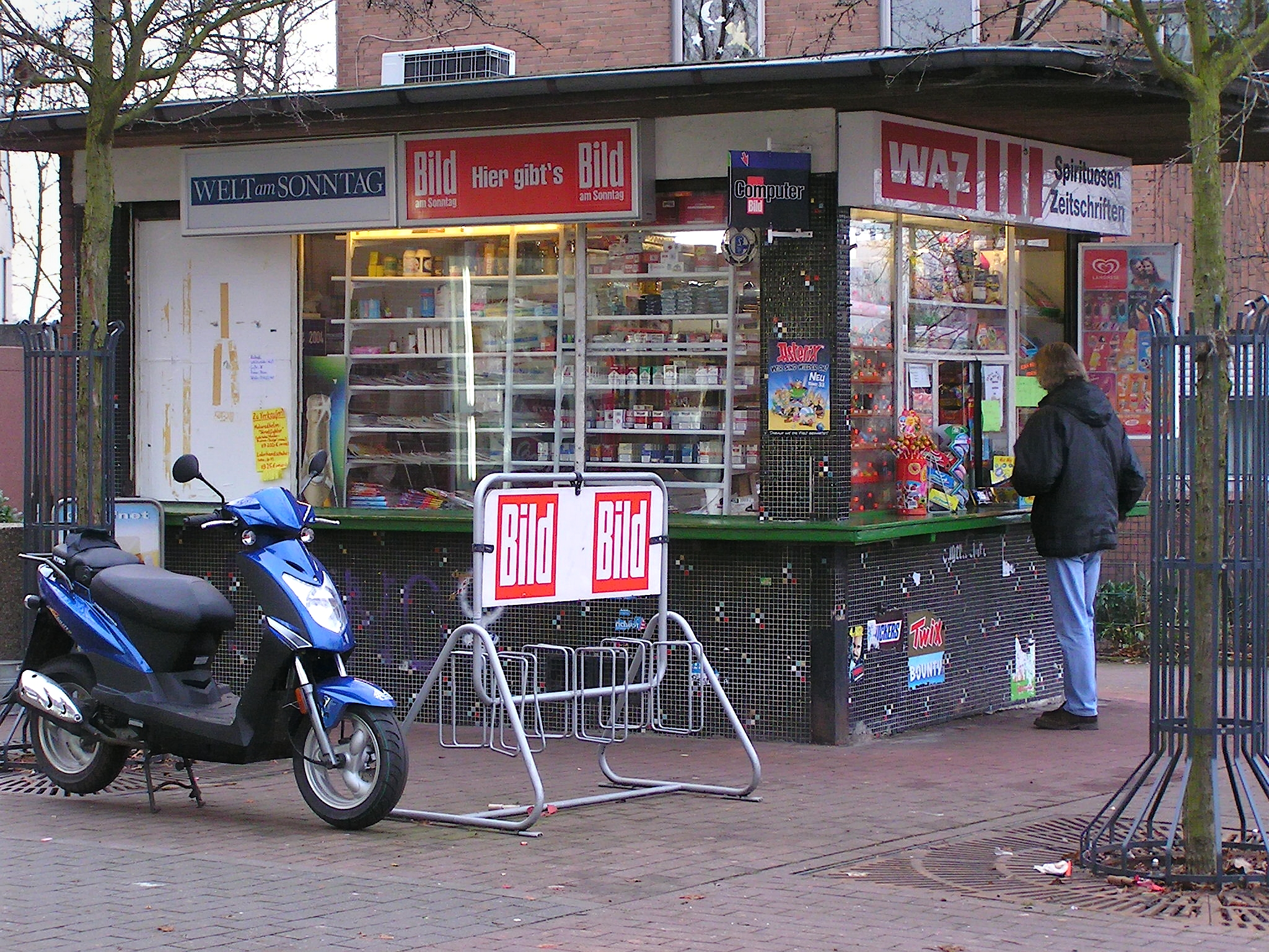 Trinkhalle („Büdchen“) in Dorsten, Ecke Bochumer Straße/Vestische Allee (Marler Straße), in Nordrhein-Westfalen, Deutschland.